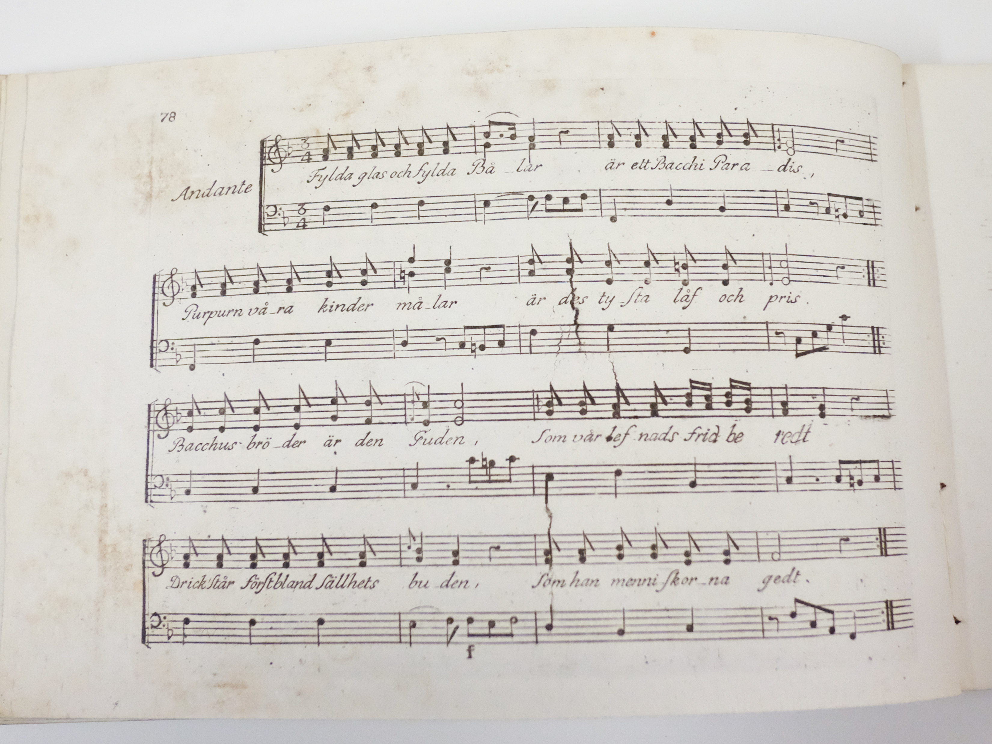 Snapsvisa ur Musikaliskt tidsfördrif (noter)